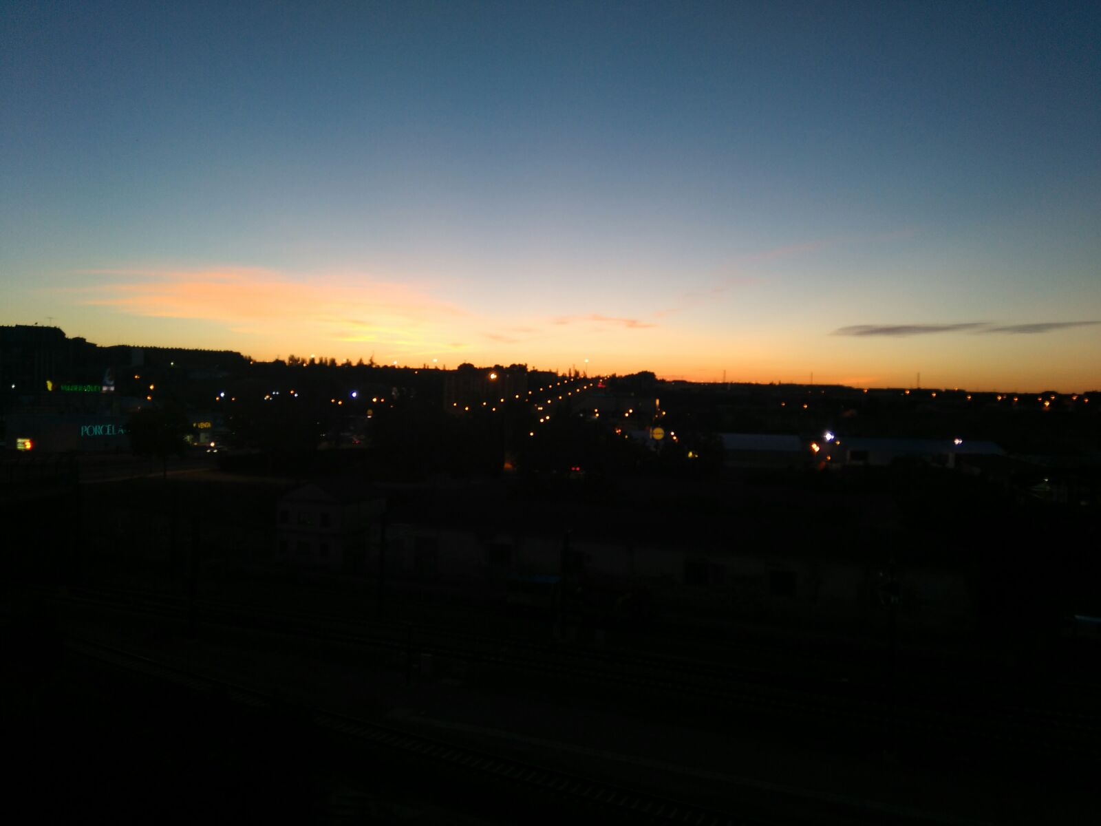 Crepúsculo vespertino en Zamora el 13 de Julio de 2016. Foto Mercedes Sánchez Pascual